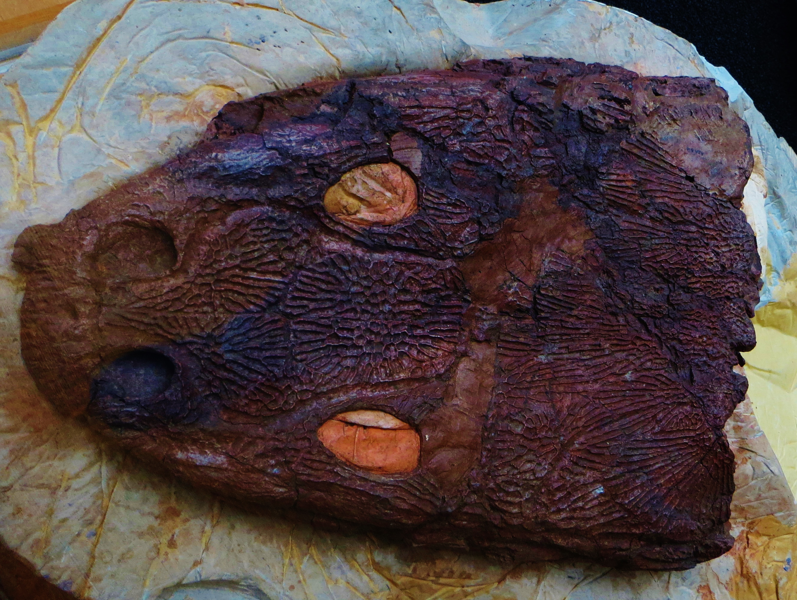 Fossil of Dutuitosaurus, an extinct amphibian- Took the photo at Musee d'Histoire Naturelle, Paris